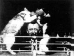 les chats qui boxent du court métrage Boxing Cats (Boxing Cats